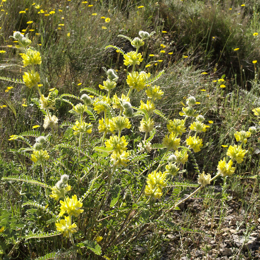 Vista general de la planta